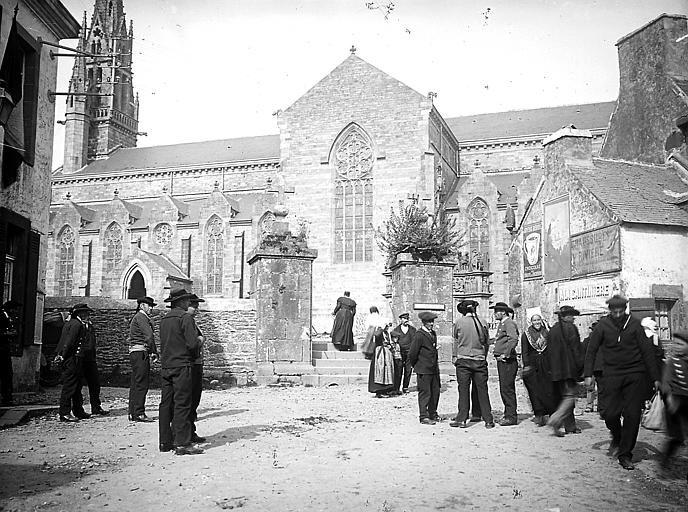 Plougastel-Daoulas : l'ancienne église de style gothique flamboyant en 1907 (Henri Deneux)